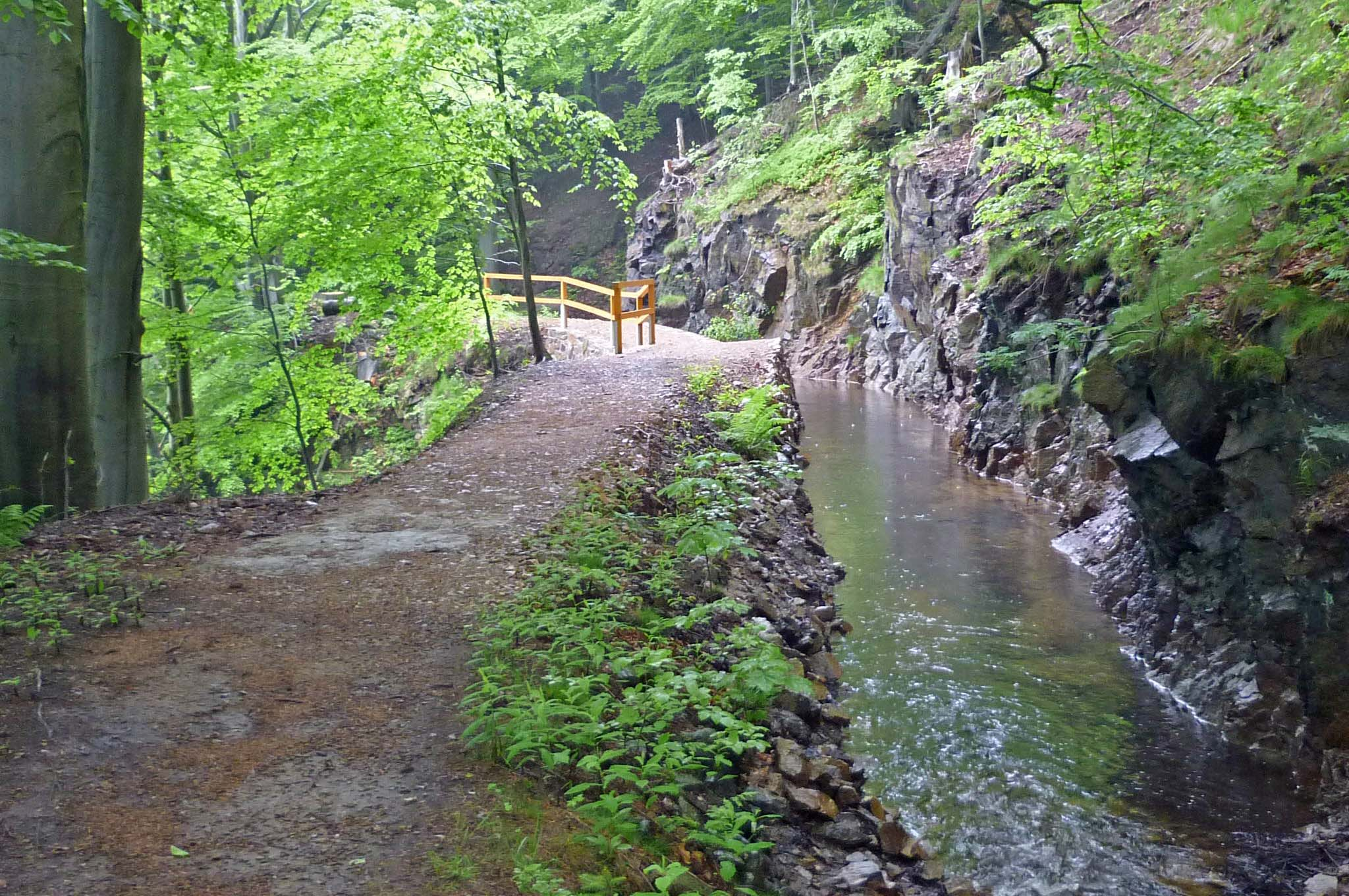 Floßgraben auf böhmischer Seite oberhalb von Georgendorf (Český Jiřetín) mit neuer Wasserführung